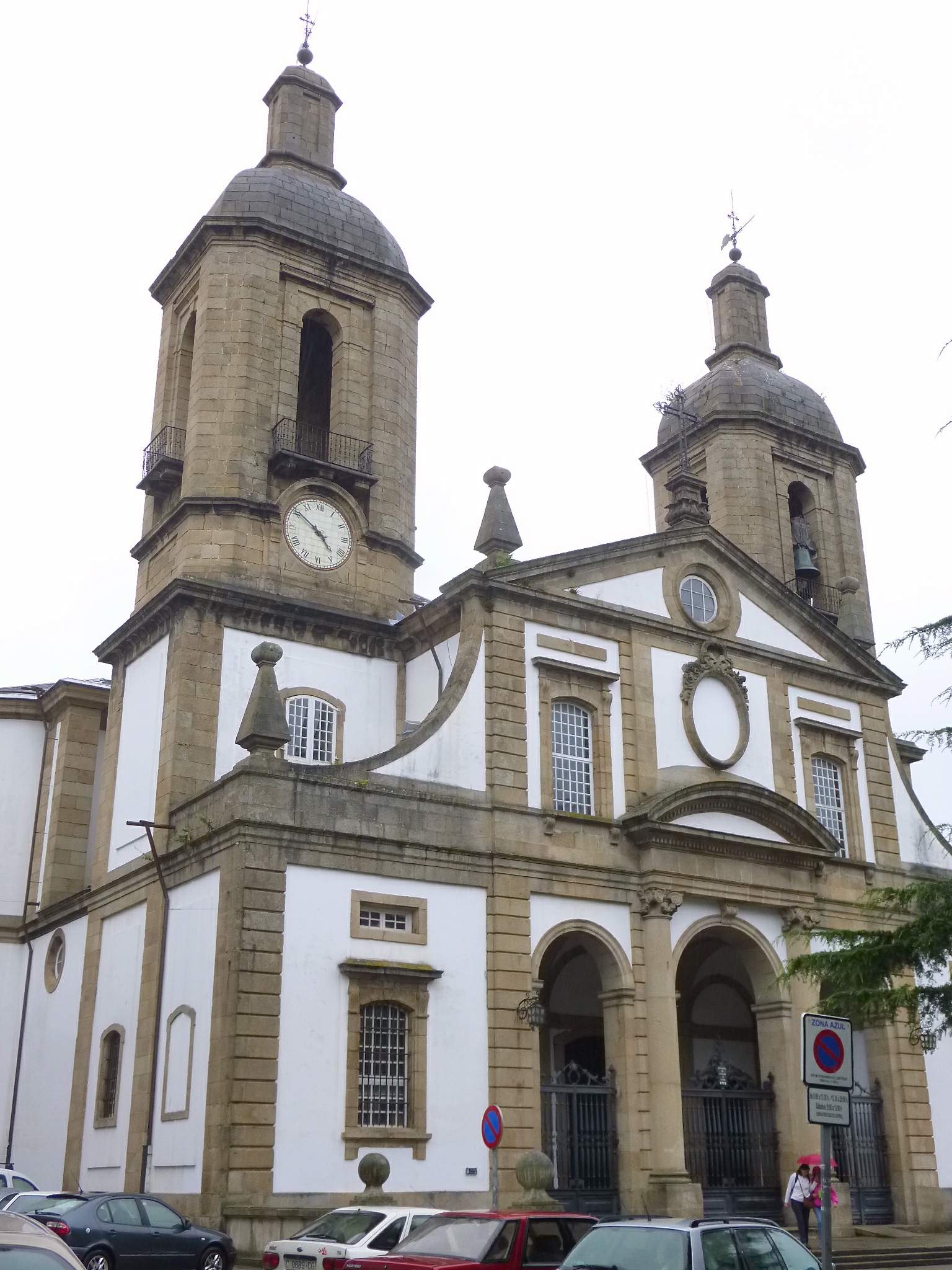 Ferrol - Concatedral de San Julián (San Xiao)